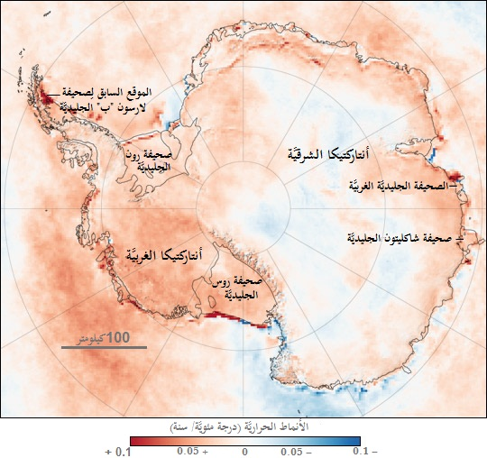 خارطة تُبيِّن الحرارة السطحيَّة في القارَّة القُطبيَّة الجنوبيَّة (أنتاركتيكا) بين سنتيّ 1981 و2007م.